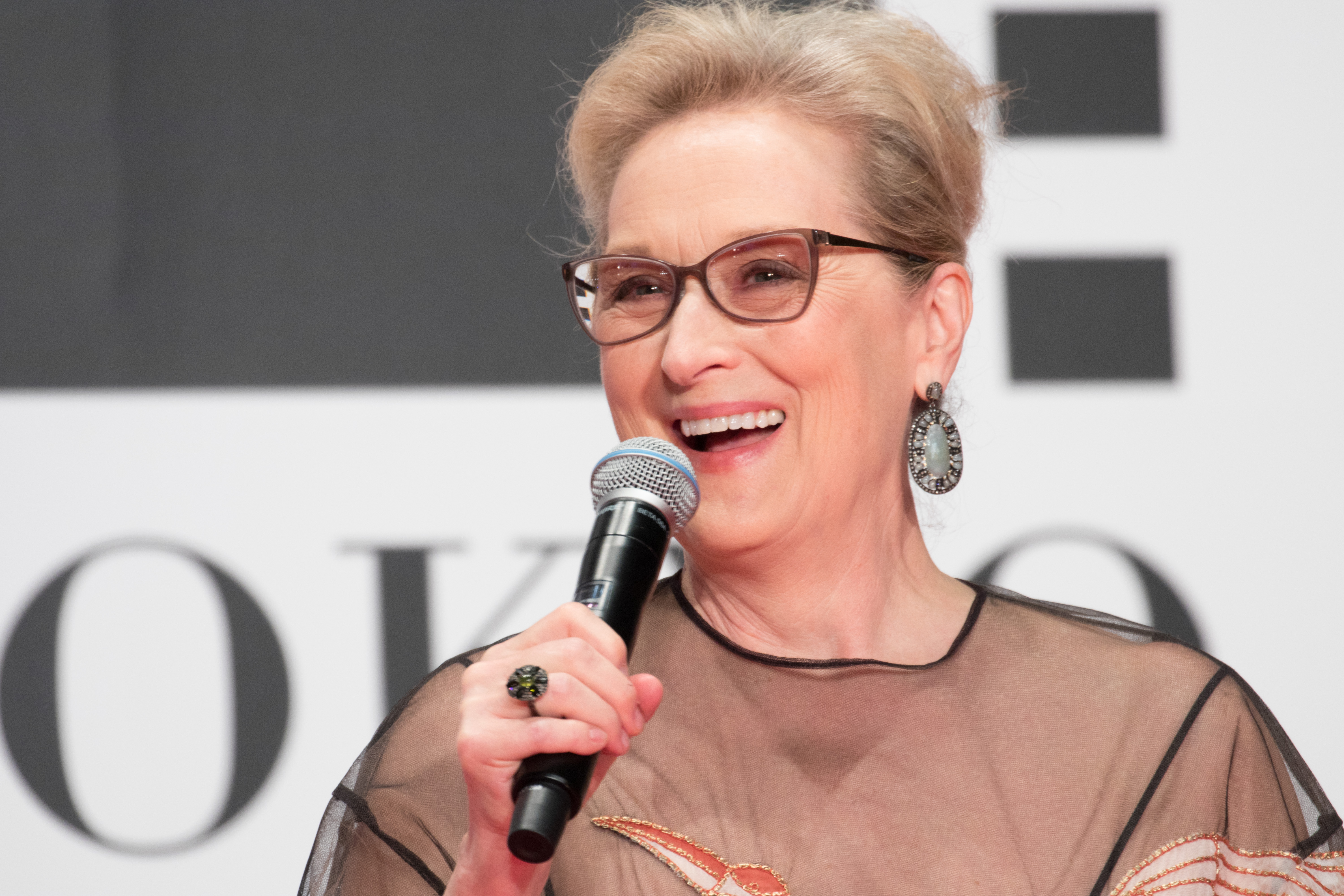 第29回 東京国際映画祭 オープニングセレモニー メリル・ストリープ (マダム・フローレンス! 夢見るふたり)